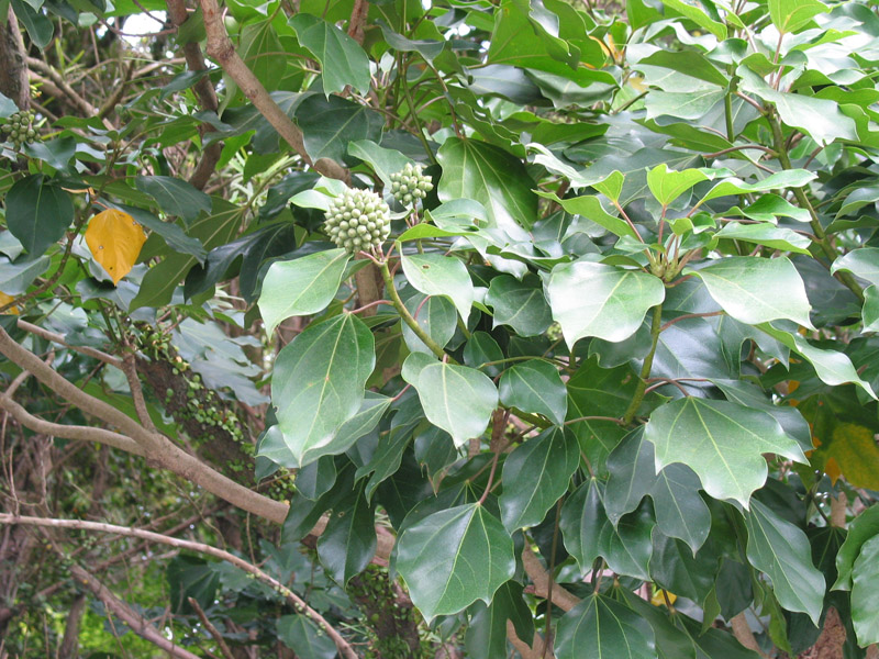 Dendropanax trifidus (Thunb.) Makino . カクレミノ（隠蓑） ウコギ科カクレミノ属